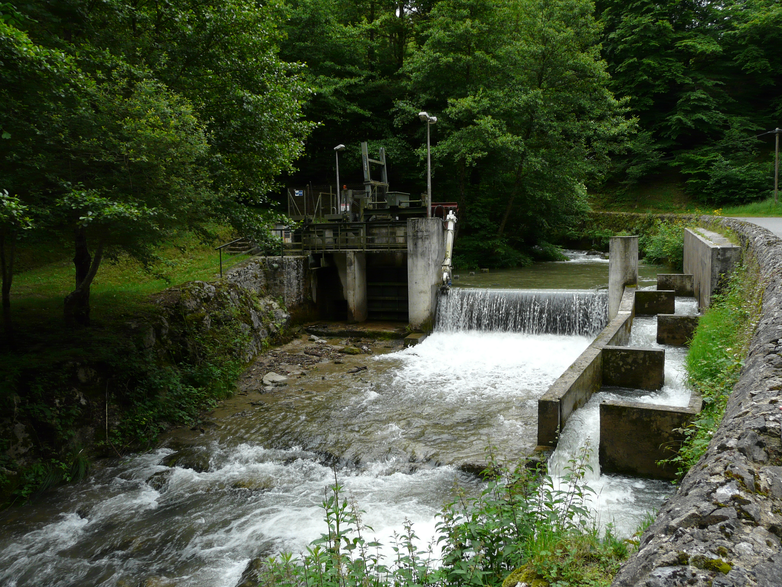 Barrage et échelle à poissons sur l'Ourse de Sost à Esbareich, Hautes-Pyrénées, France.